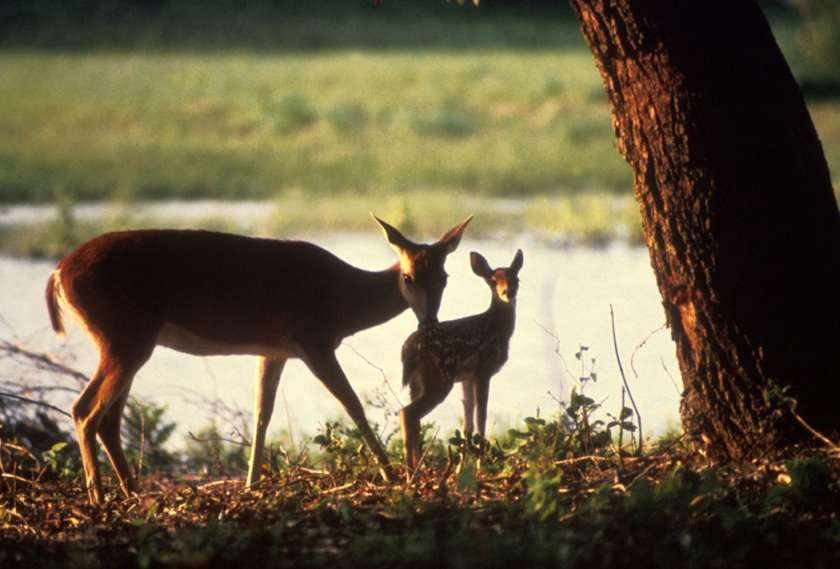 Weißwedelhirsch, Hirschkuh mit Kitz